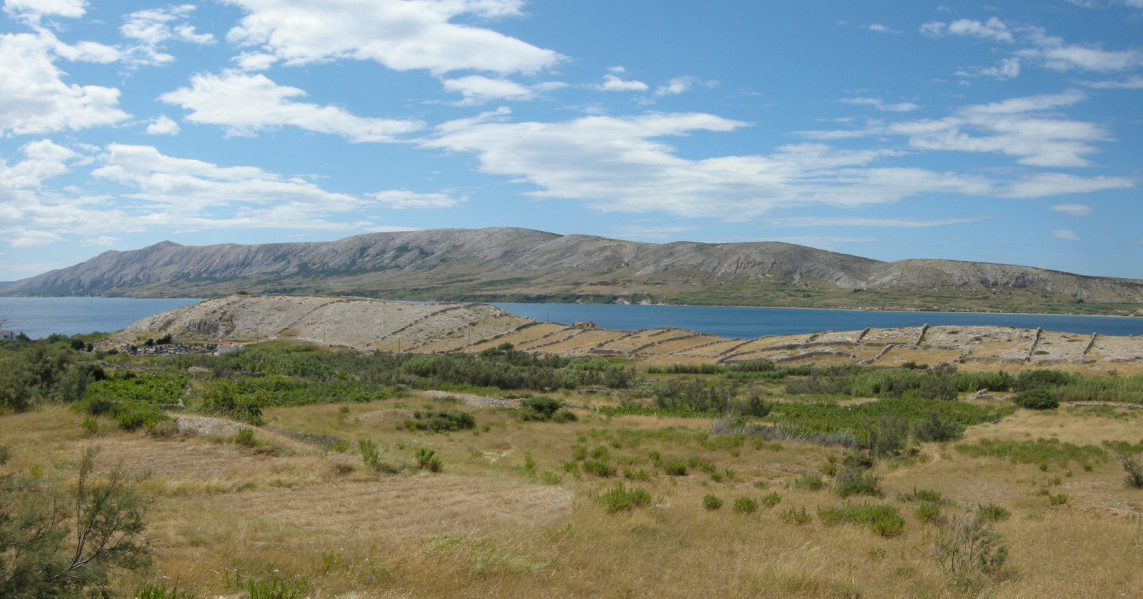 Pag widziany z Zubovići (droga do Metajny)